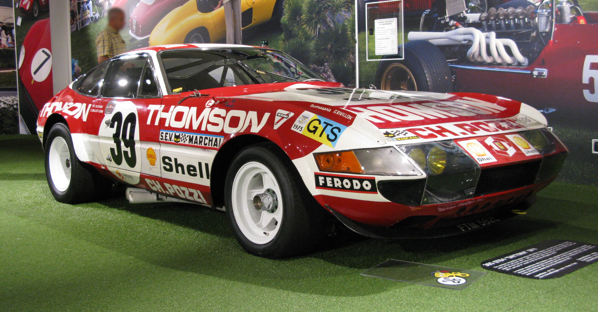 1973 Ferrari 365 GTB/4 Competizione s/n 16373